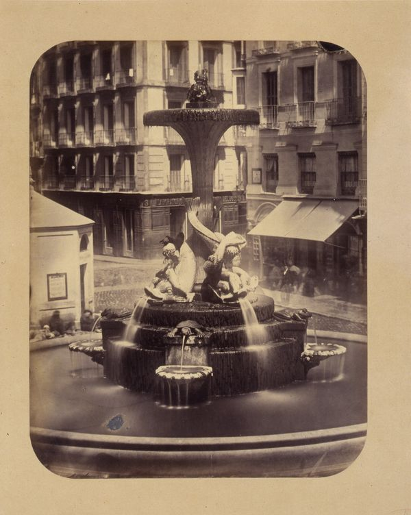 Fuente de ornato de la Red de San Luis. Obra en 1864 del fotógrafo toledano Alfonso Begué, muerto el 31 de octubre de 1865. Cartulina sepia. Albúmina. 43 x 32 cm. Fotografía contenida en un álbum procedente del Archivo de Villa y trasladado al Museo de Historia en 1983.